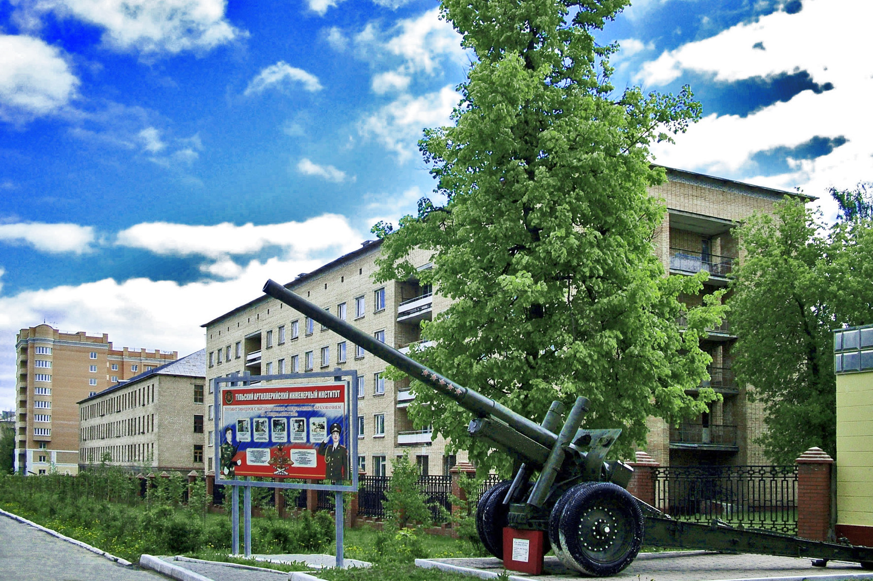 Комплекс жилых зданий Тульского АИИ. Город Тула, проспект Ленина, 99